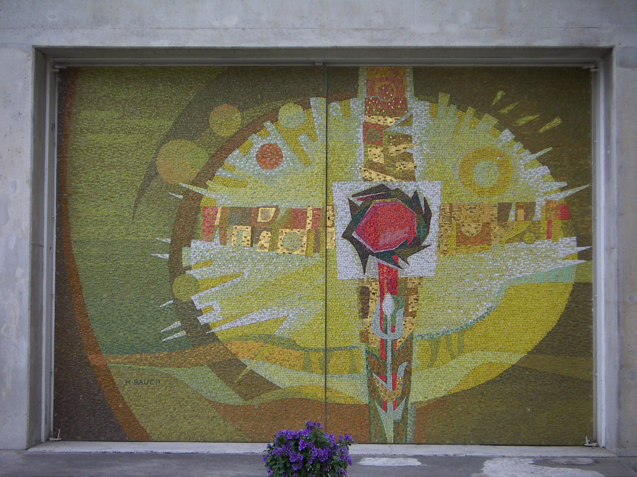 Konzilsgedächtniskirche Lainz Speising, Tor mittig Fassade zur Lainzer Straße